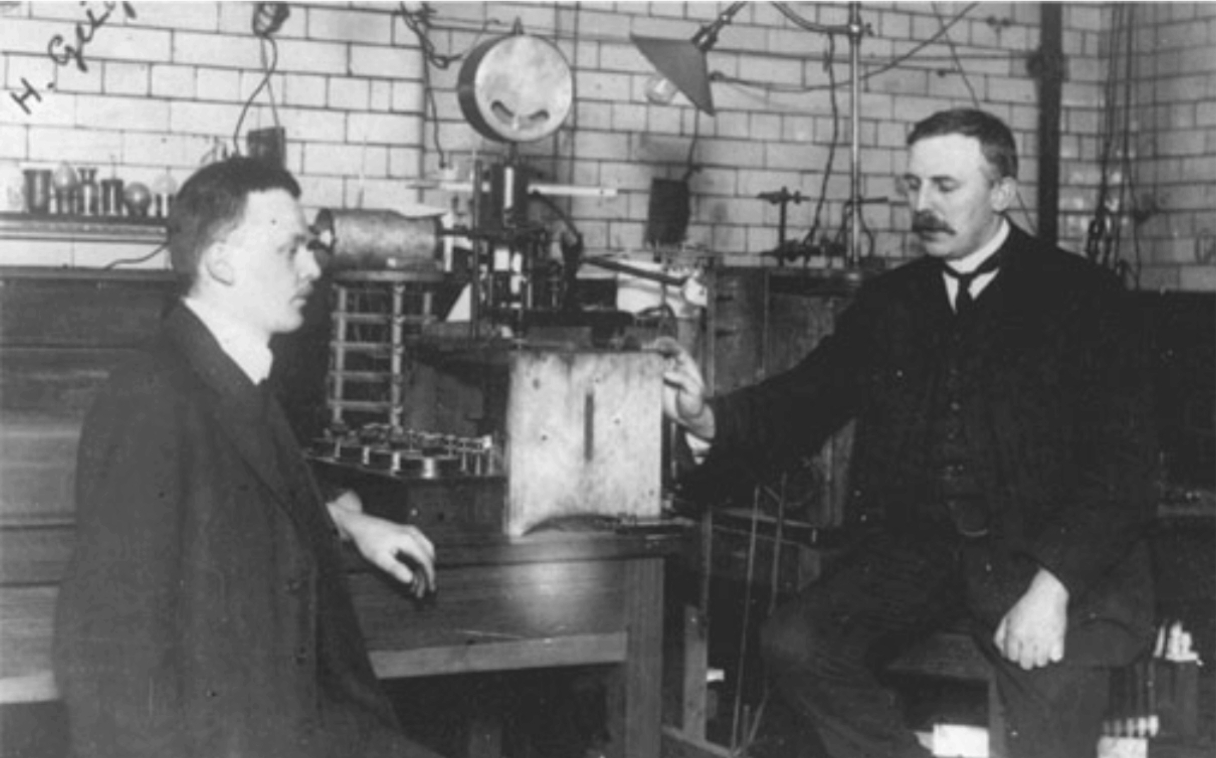 Hans Geiger (* 30. September 1882 in Neustadt an der Weinstraße; † 24. September 1945 in Potsdam) und Ernest Rutherford (* 30. August 1871 in Spring Grove bei Nelson; † 19. Oktober 1937 in Cambridge, Vereinigtes Königreich) im Labor von McGill (McGill University in Montreal)